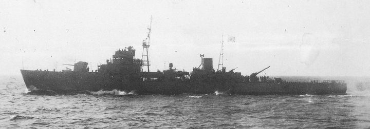 鵜来型海防艦『新南』、東京湾